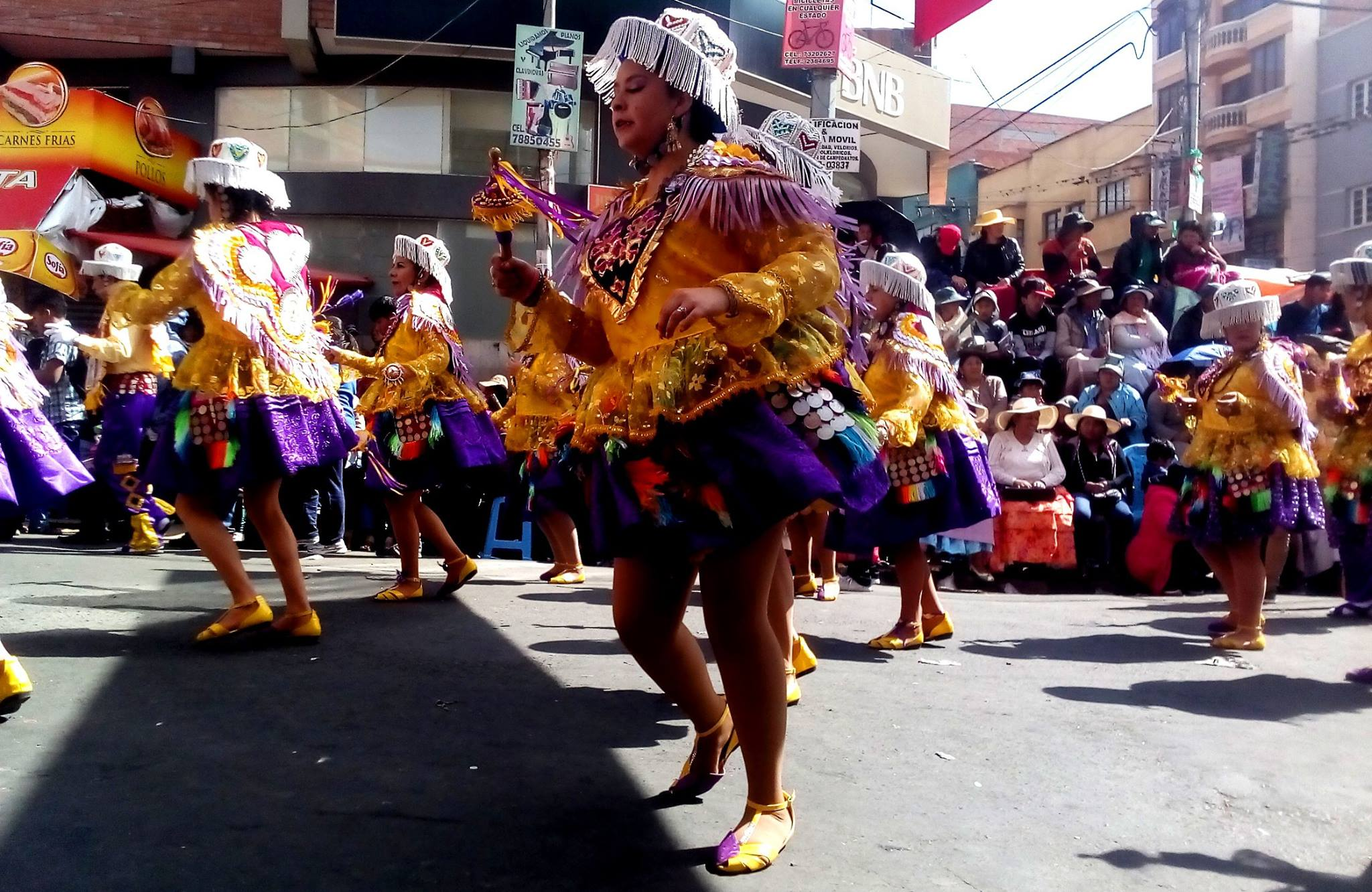 La Paz Bolivia 2017